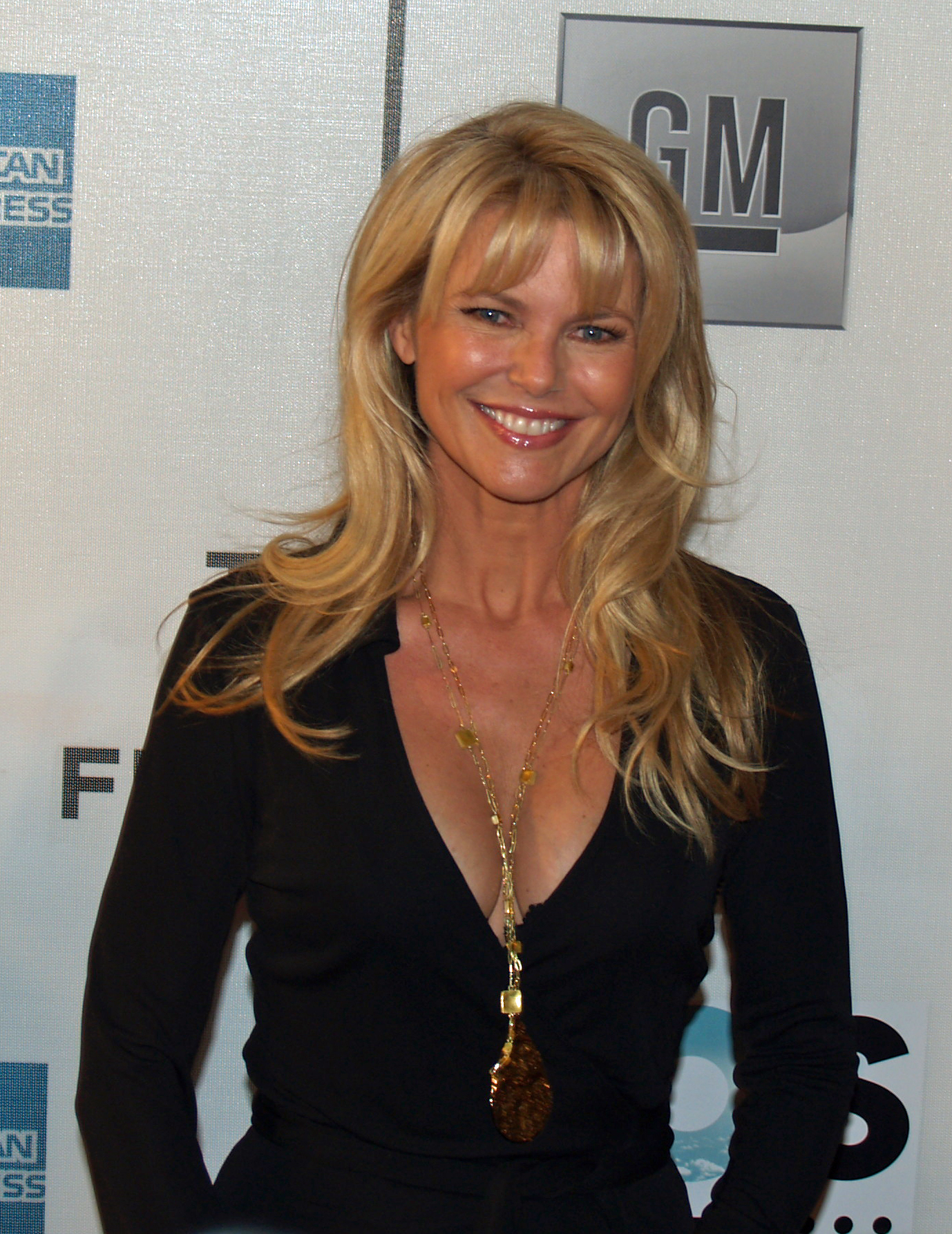 Christie Brinkley